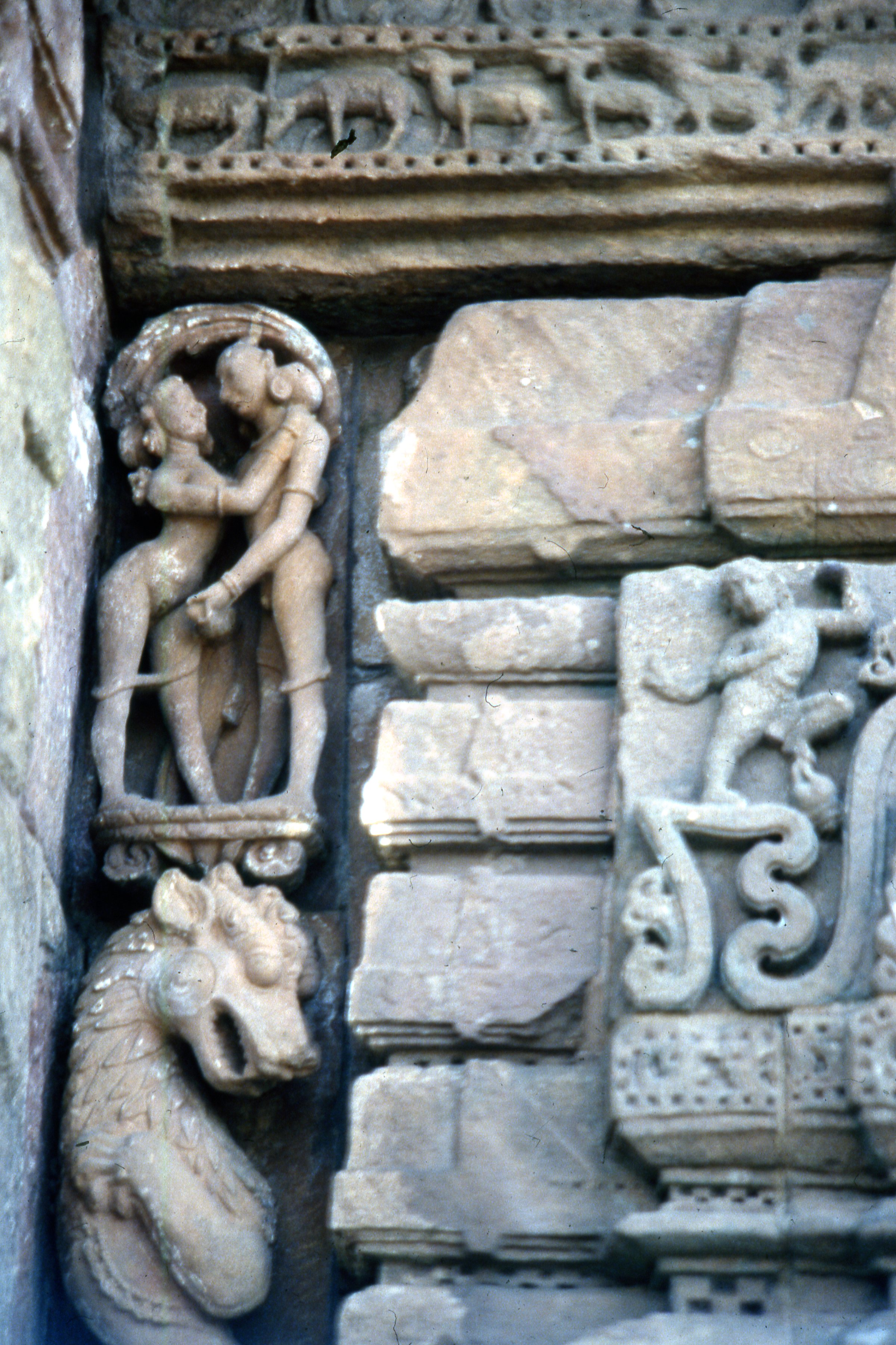 Orissa,Bhuvanesvar, India, SigloXI, Templo Rajarani/ Templo Indreswara, Hinduismo,Detalle de la fachada del templo donde se observa una representación del Maithuna o acto sexual ritual